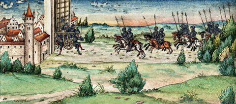 Lorenz Fries, Chronik der Bischöfe von Würzburg, folio 523v (Einnahme Mainbernheims 1495 durch Anton von Bibra und Neithard von Thüngen, damals Teil Böhmens)